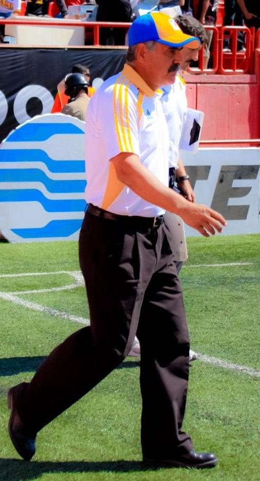 xolos vs tigres en el estadio caliente de tijuana para el apertura 2011 del futbol mexicano